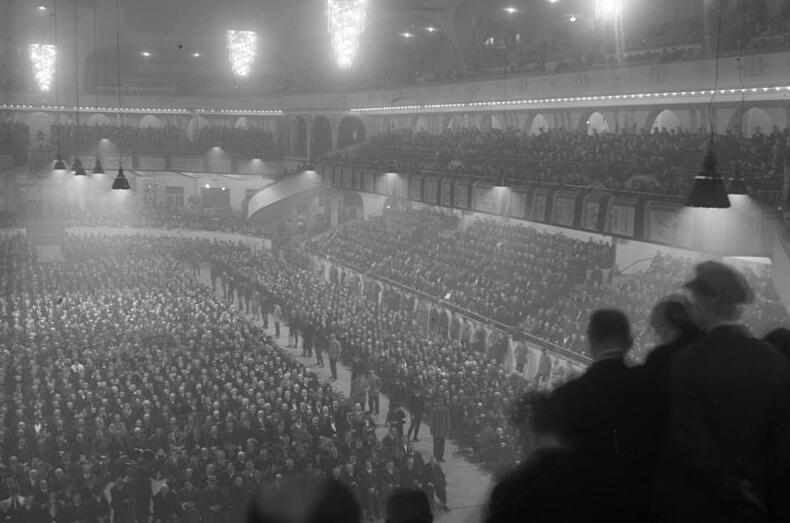 Riesenkundgebung der "Eisernen Front" des deutschen republikanischen Reichsbanners im Sportpalast in Berlin ! Der berühmte deutsche Dichter Fritz von Unruh hielt die Ansprache. Blick in den Riesensaal des Berliner Sportpalastes mit über Zehntausend Versammelter während der Veranstaltung des Reichsbanners.